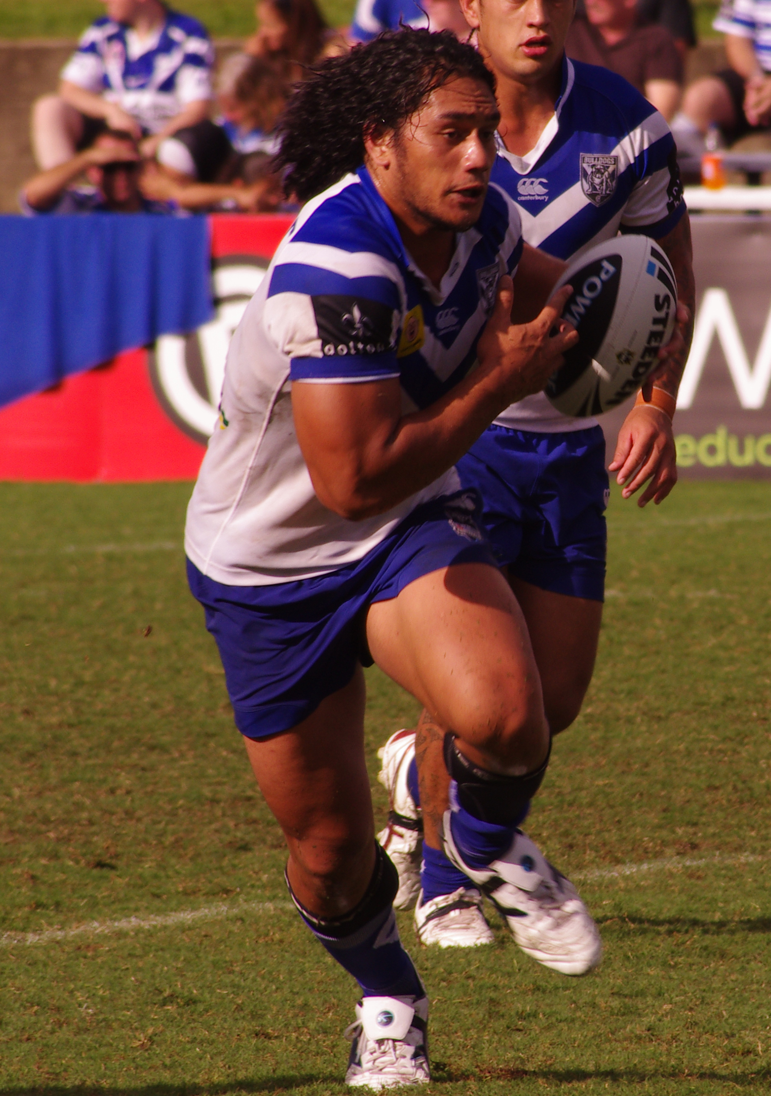 Martin taupau